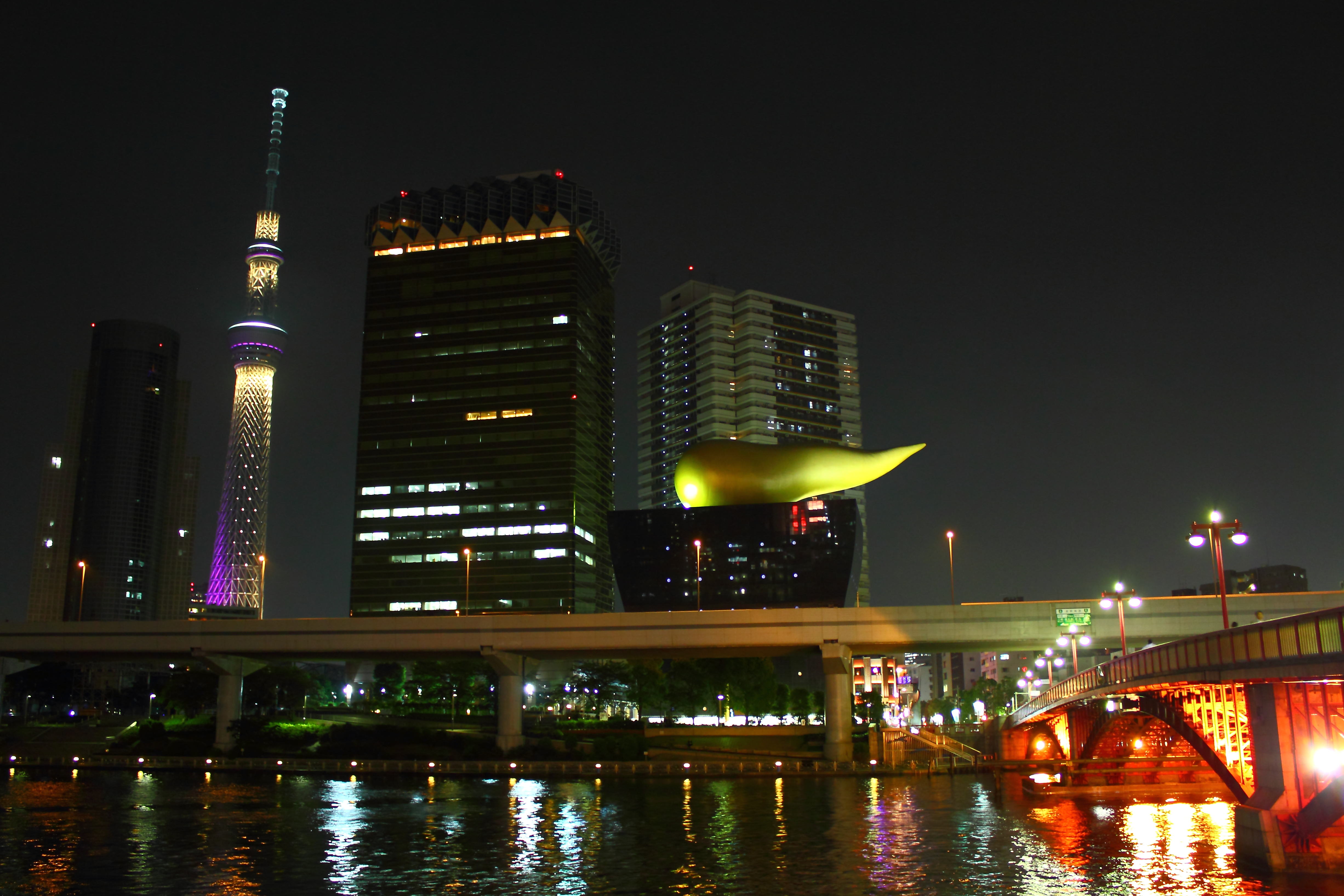 スカイツリー、アサヒビール本社。吾妻橋より。